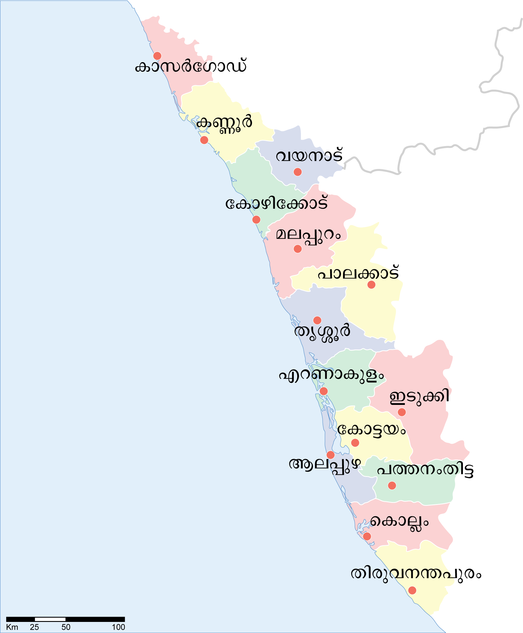 കേരളത്തിന്റെ രാഷ്ട്രീയ ഭൂപടം